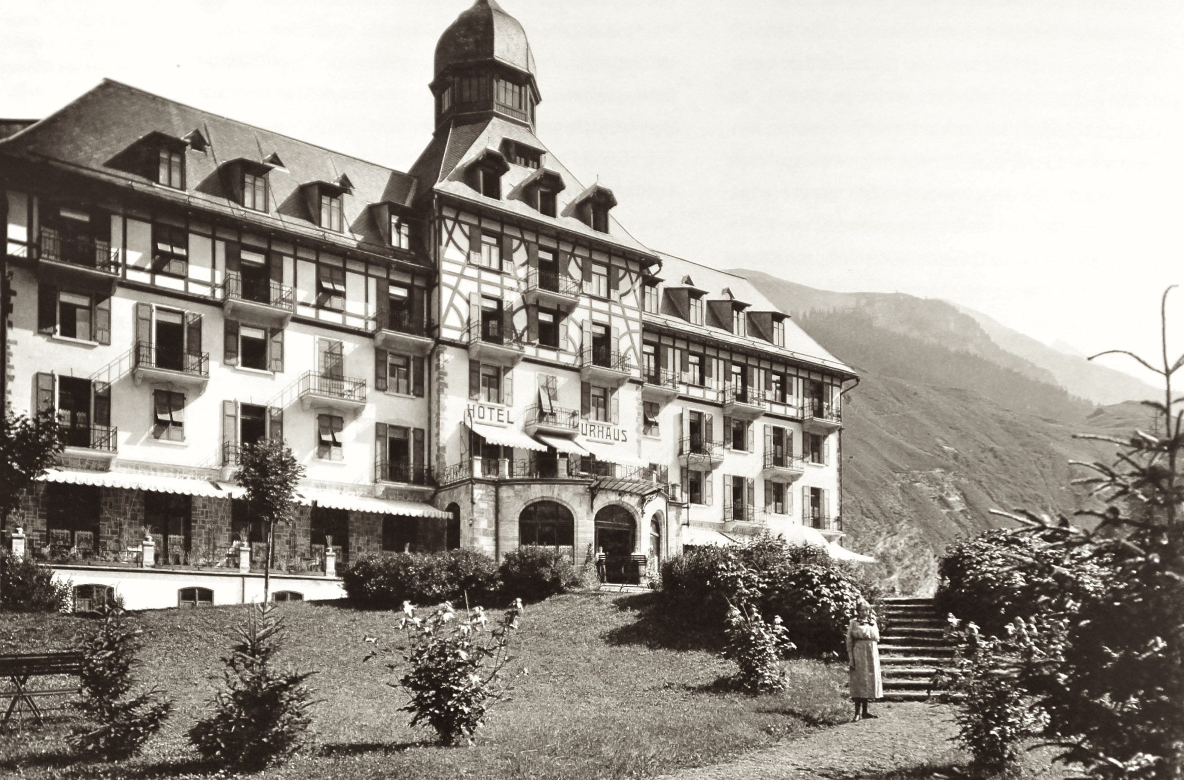 Kurhaus Bergün 1910